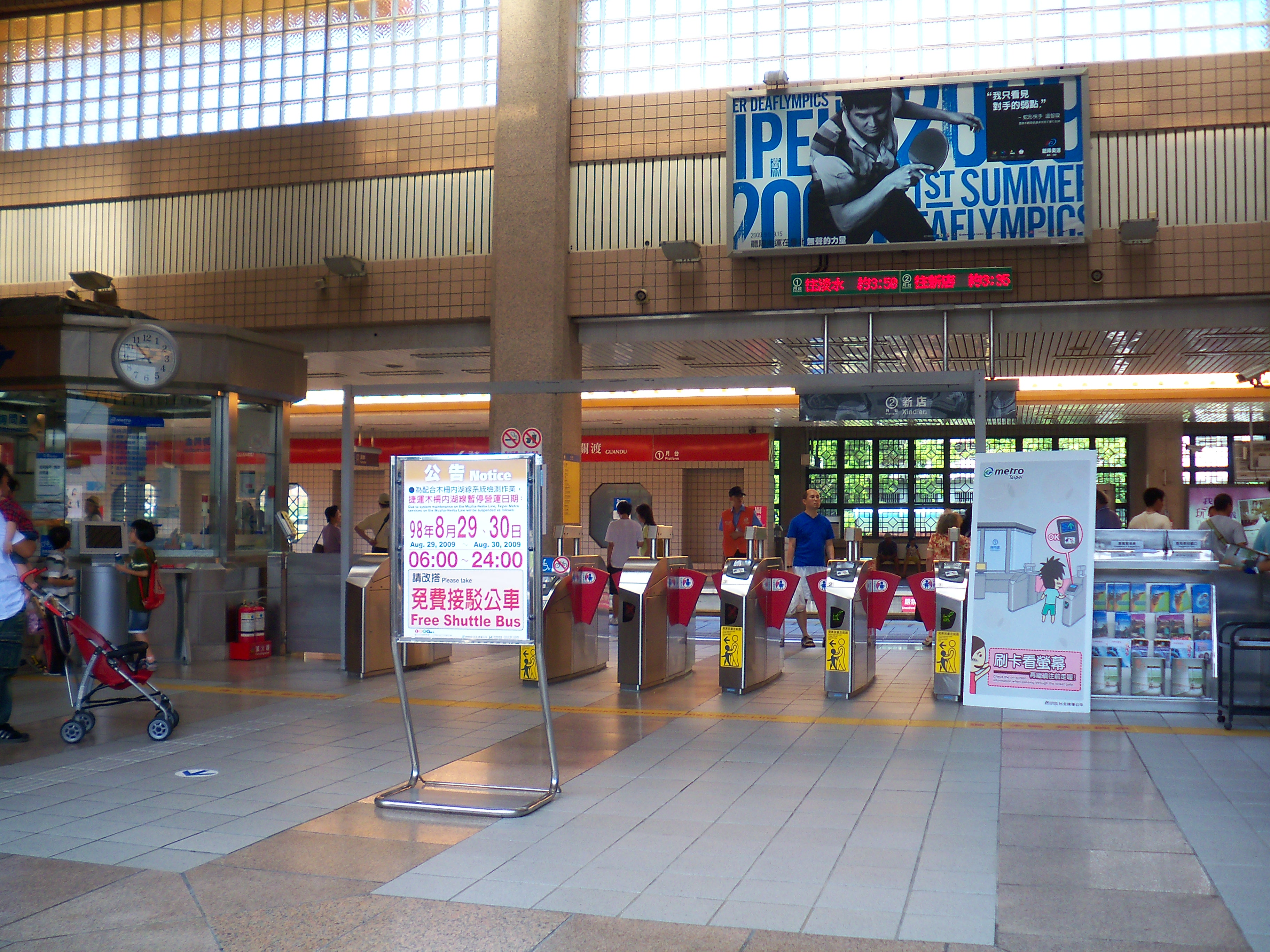 台北捷運淡水線関渡駅改札口。